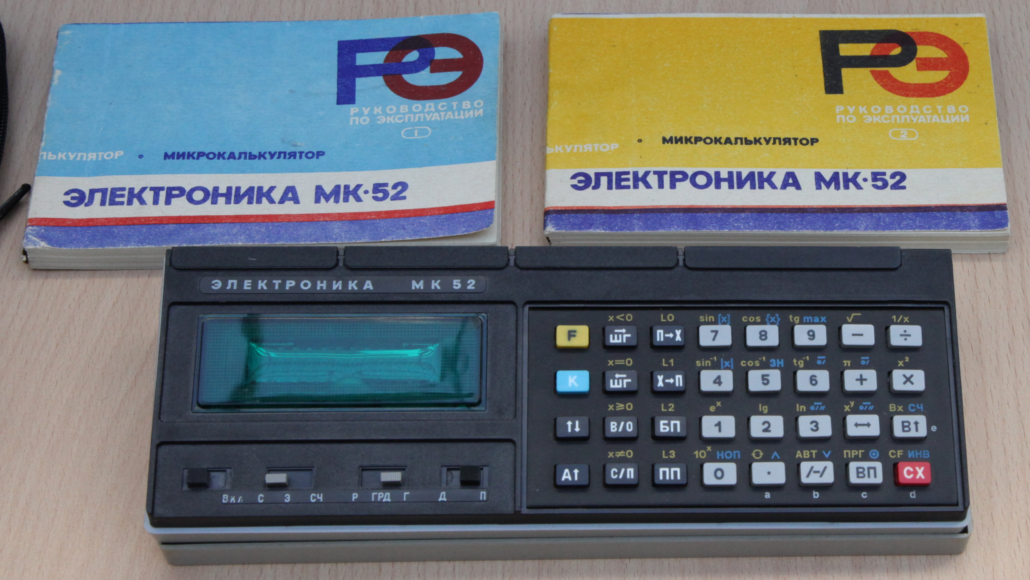 Elektronika MK52 Электро́ника МК-52 Taschenrechner Zeitraumː 1983-1991 ROMː512 B RAMː 15 Register, 105 Programmschritte Displayː VFD, 8+2 Zeichen Größe: 78 x 212 x 35 mm Gewicht: 250 g 4 x AA Batterie